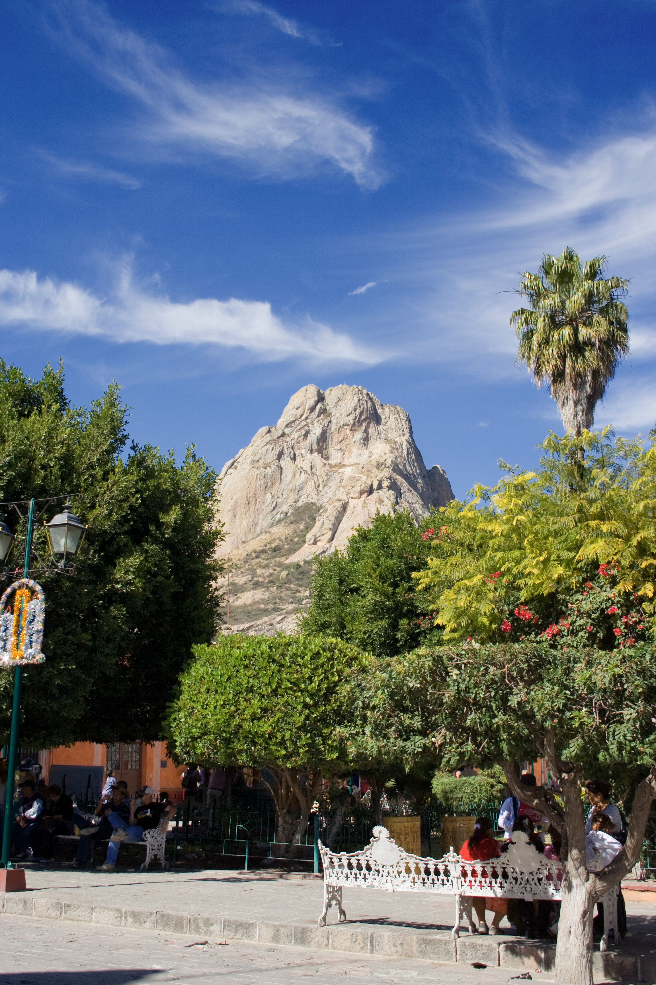 Bernal